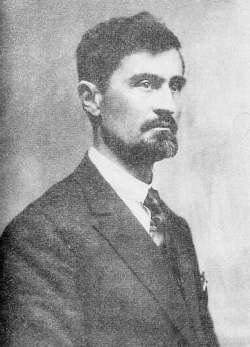 Todor Alexandrov